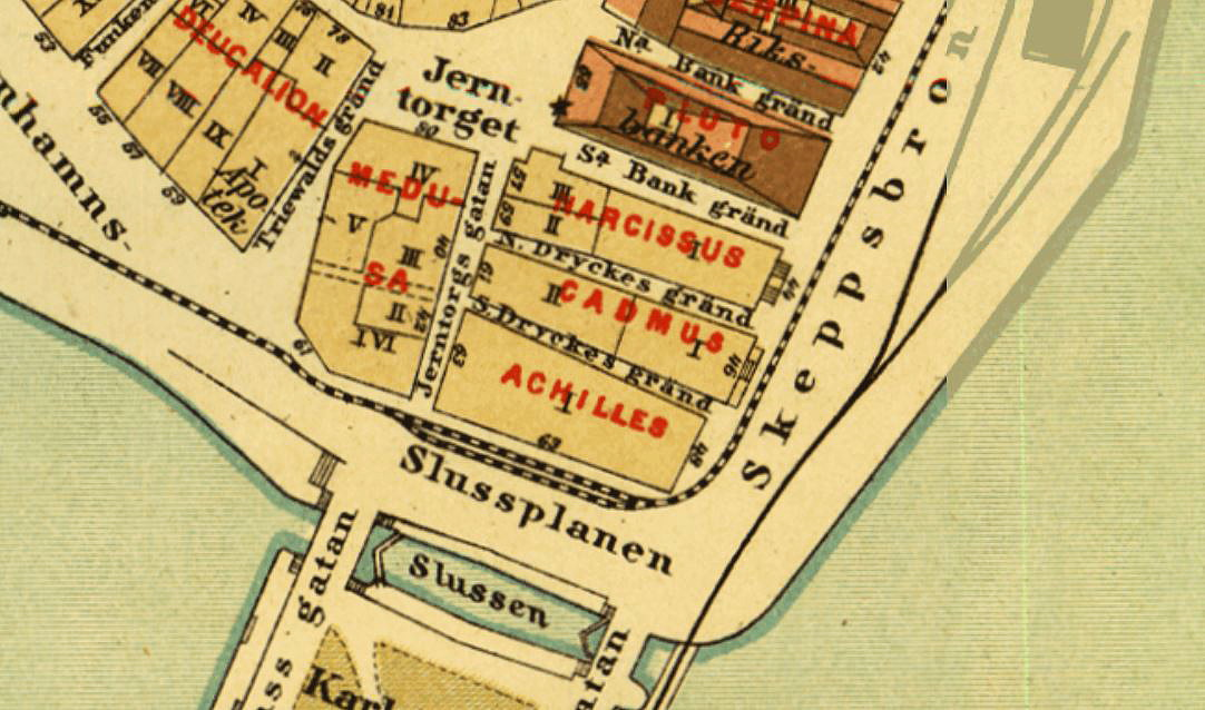 Del av Alfred Rudolf Lundgrens Stockholmskarta visande kvarteren "Achilles", "Cadmus" och "Narcissus"